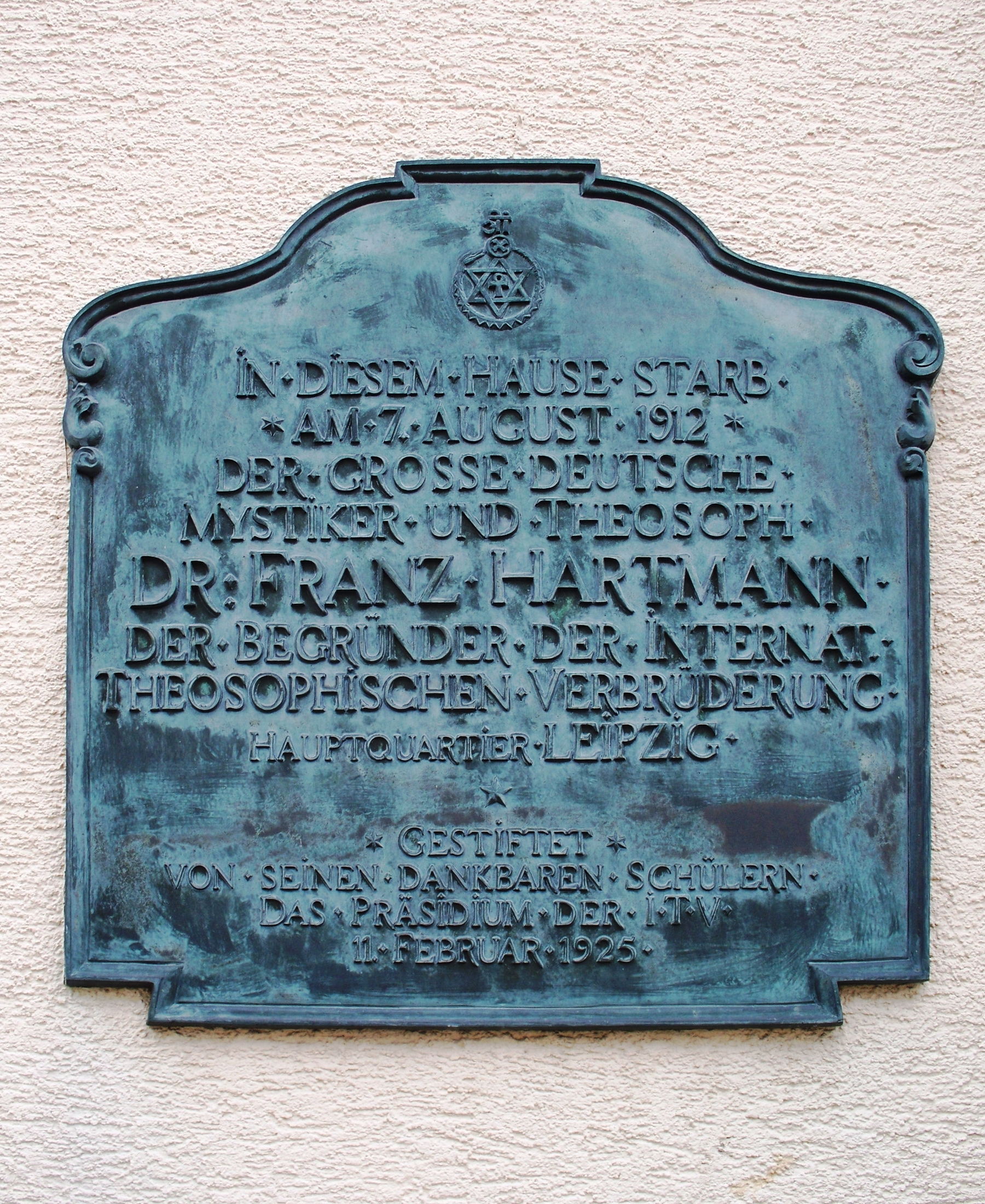 Gedenktafel für Franz Hartmann an dem Haus in Kempten (Allgäu), in dem er verstarb.